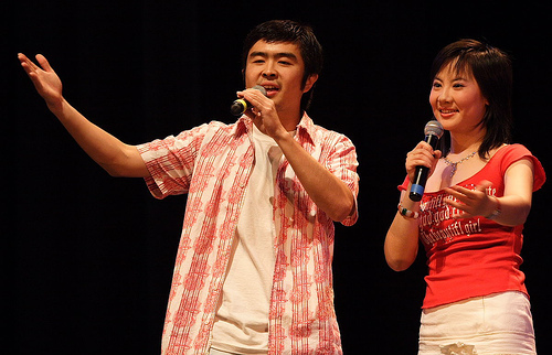 Huangmei opera informal costumeHuangmei opera informal costume